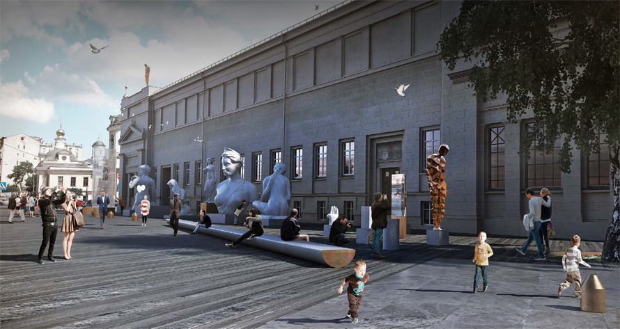 Проект "Ризосфера" по созданию музейного городка ГМИИ. Выполнен архитектурным бюро "Меганом"